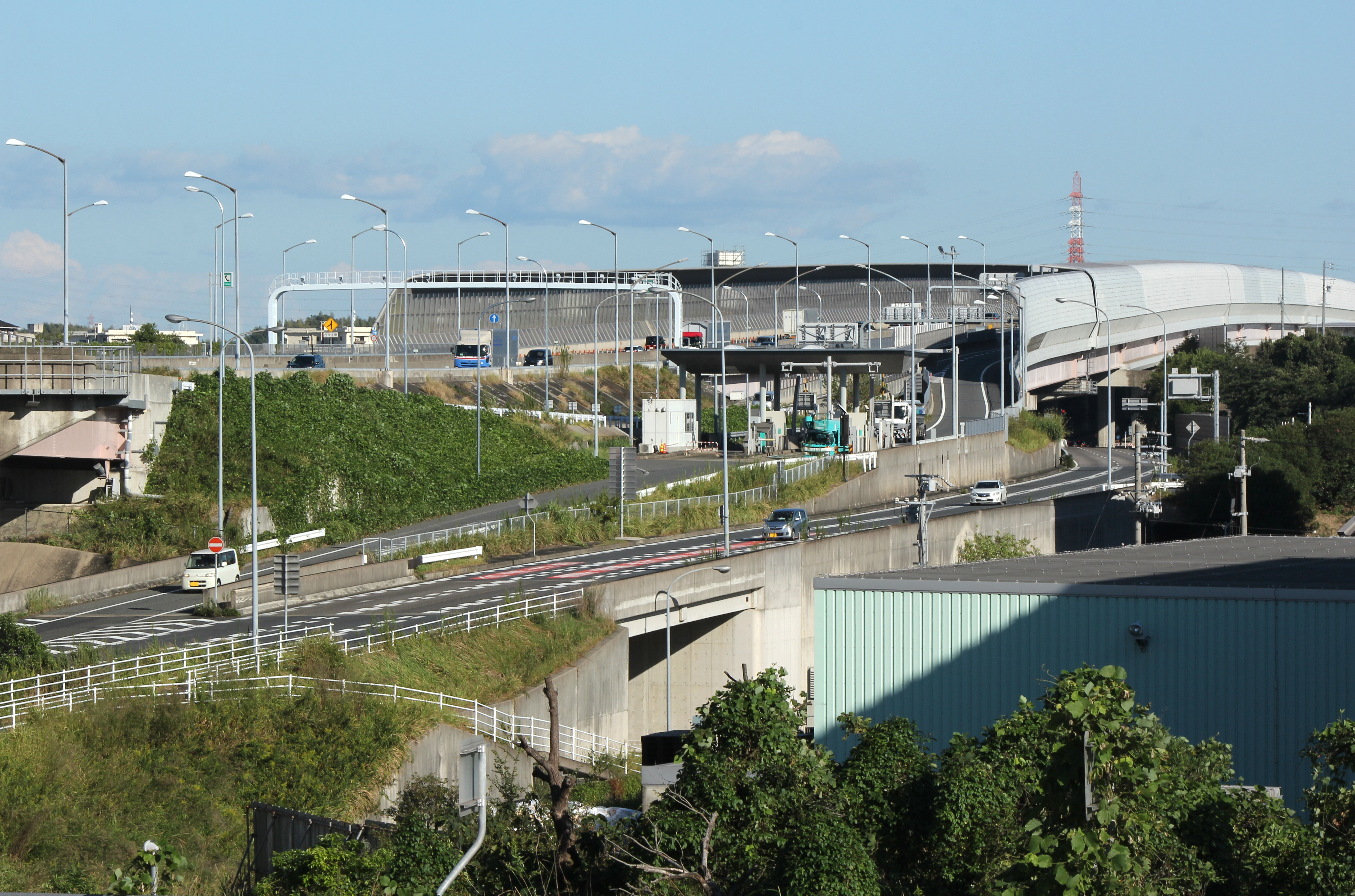 伊勢湾岸自動車道（第二東名）東海インターチェンジ（豊田方面側）